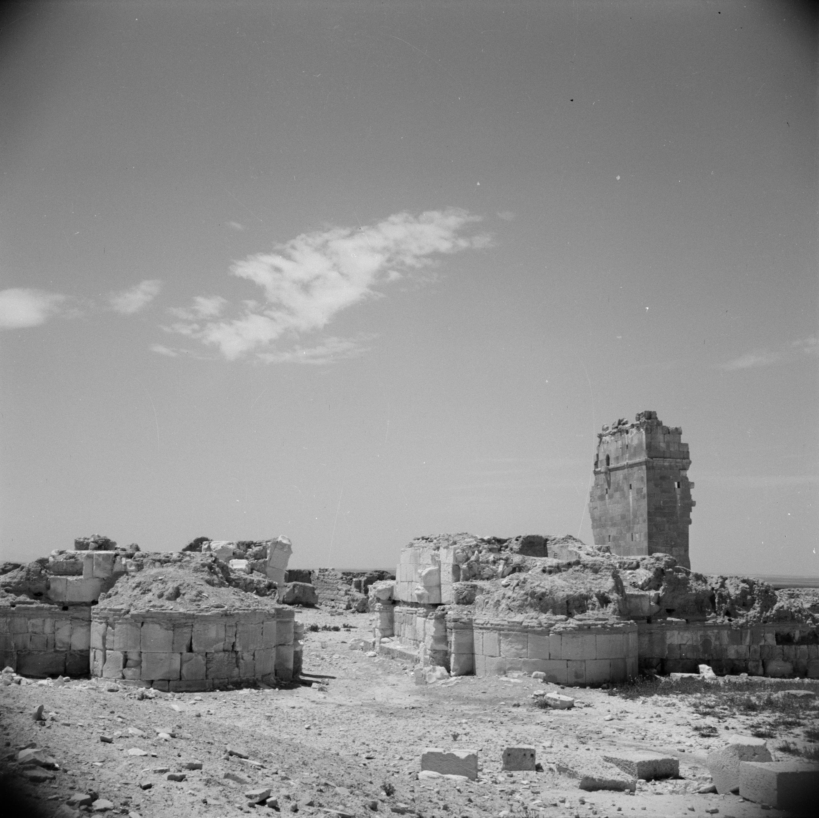 Collectie / Archief : Fotocollectie Van de Poll Reportage / Serie : Midden-Oosten 1950-1955: Syrië Beschrijving : Ruïnes van Qasr Al Hair Datum : 1950 Locatie : Syrië Trefwoorden : ruïnes Fotograaf : Poll, Willem van de Auteursrechthebbende : Nationaal Archief Materiaalsoort : Negatief (zwart/wit) Nummer archiefinventaris : bekijk toegang 2.24.14.02 Bestanddeelnummer : 255-6064